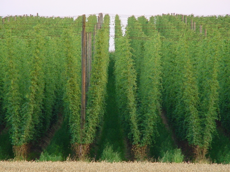 Hopfengarten (Humulus lupulus) nahe Au in der Hallertau